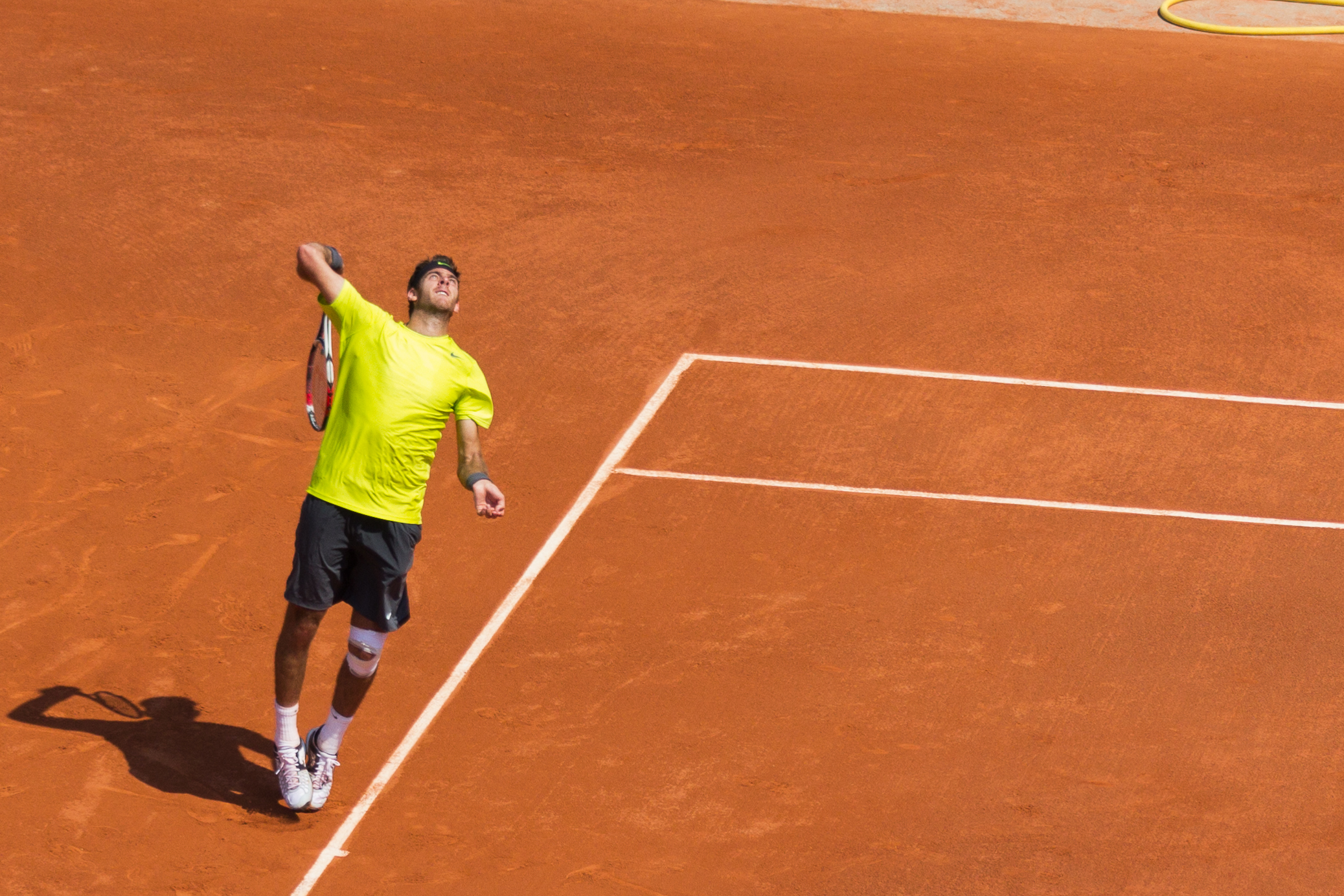 Juan Martín del Potro à Roland-Garros le 27 mai 2012, match contre Albert Montañés. Paris, France